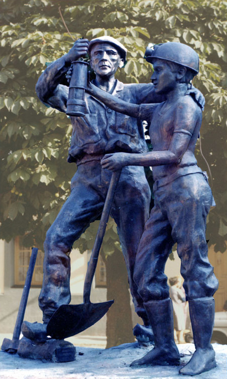 Estatua en bronce que simboliza el relevo del antiguo minero jubilado.Realizada por J. M. Fëlix Magdalena